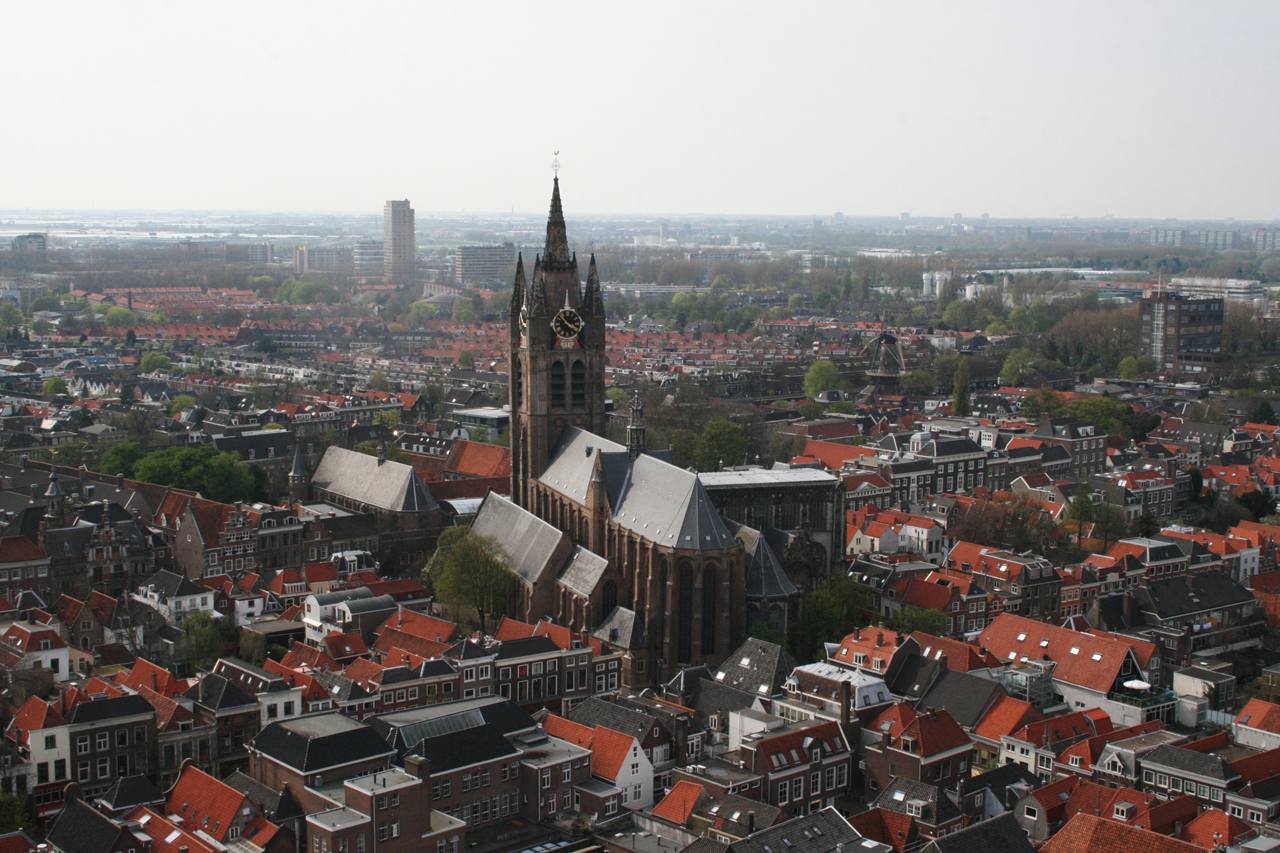 Delft